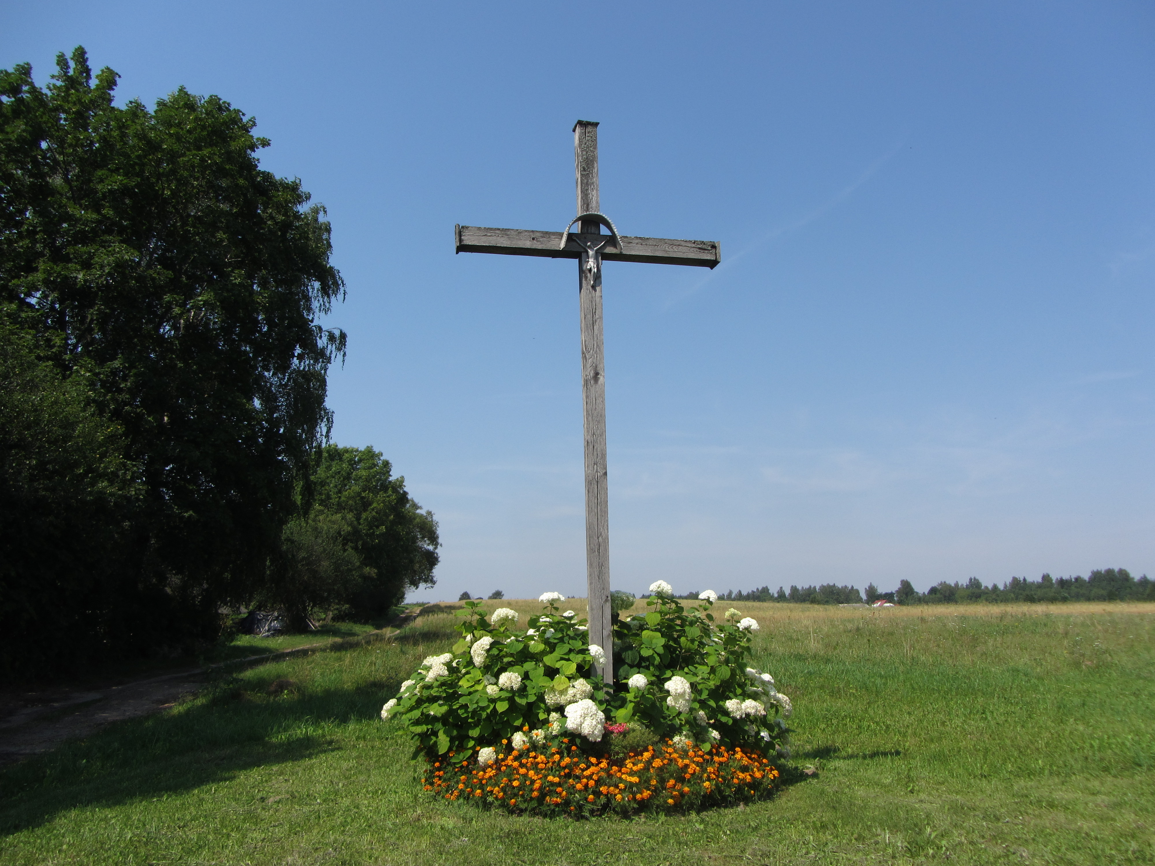 Rukainiai, Lithuania